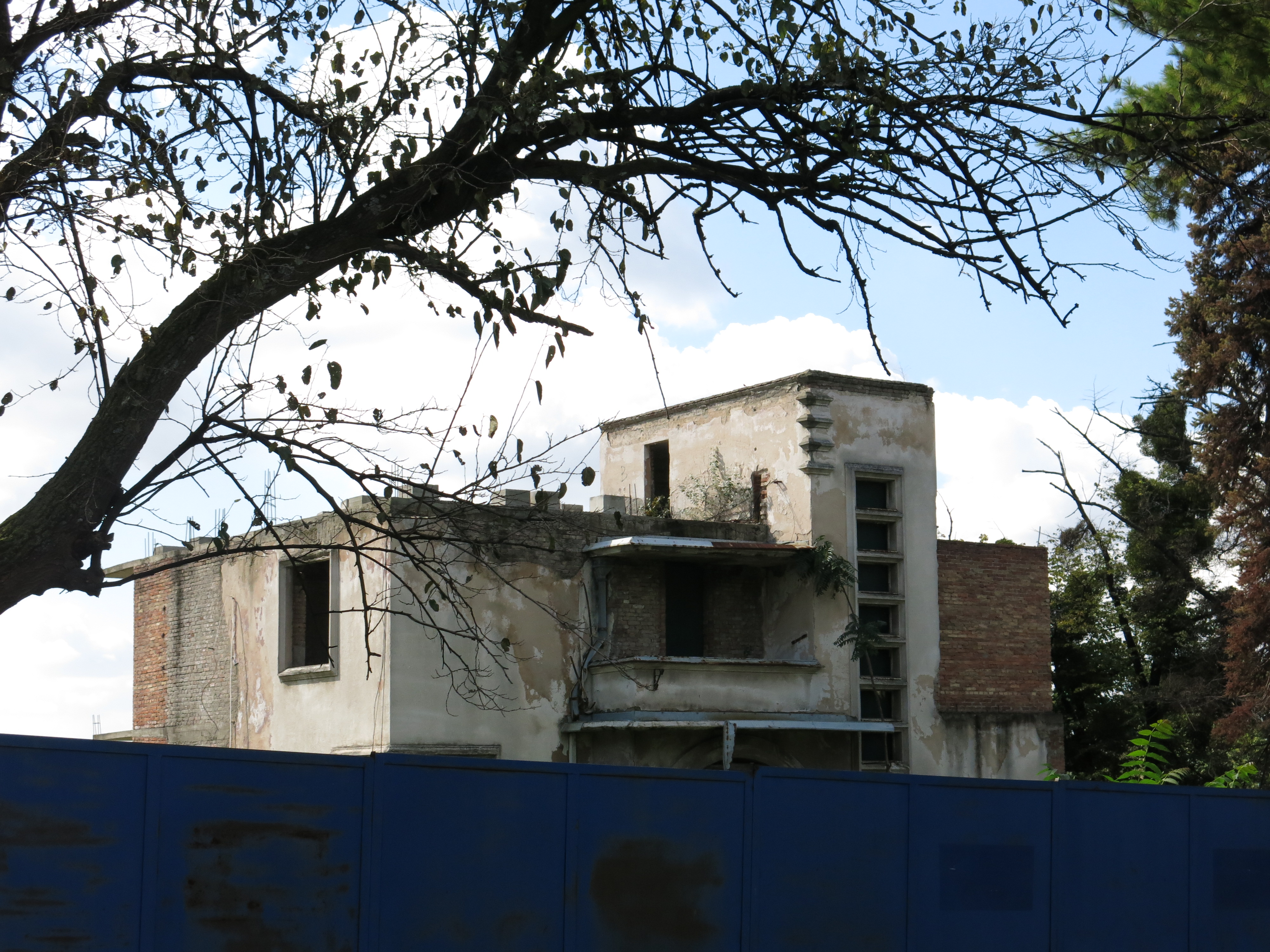 Вила Душана Томића